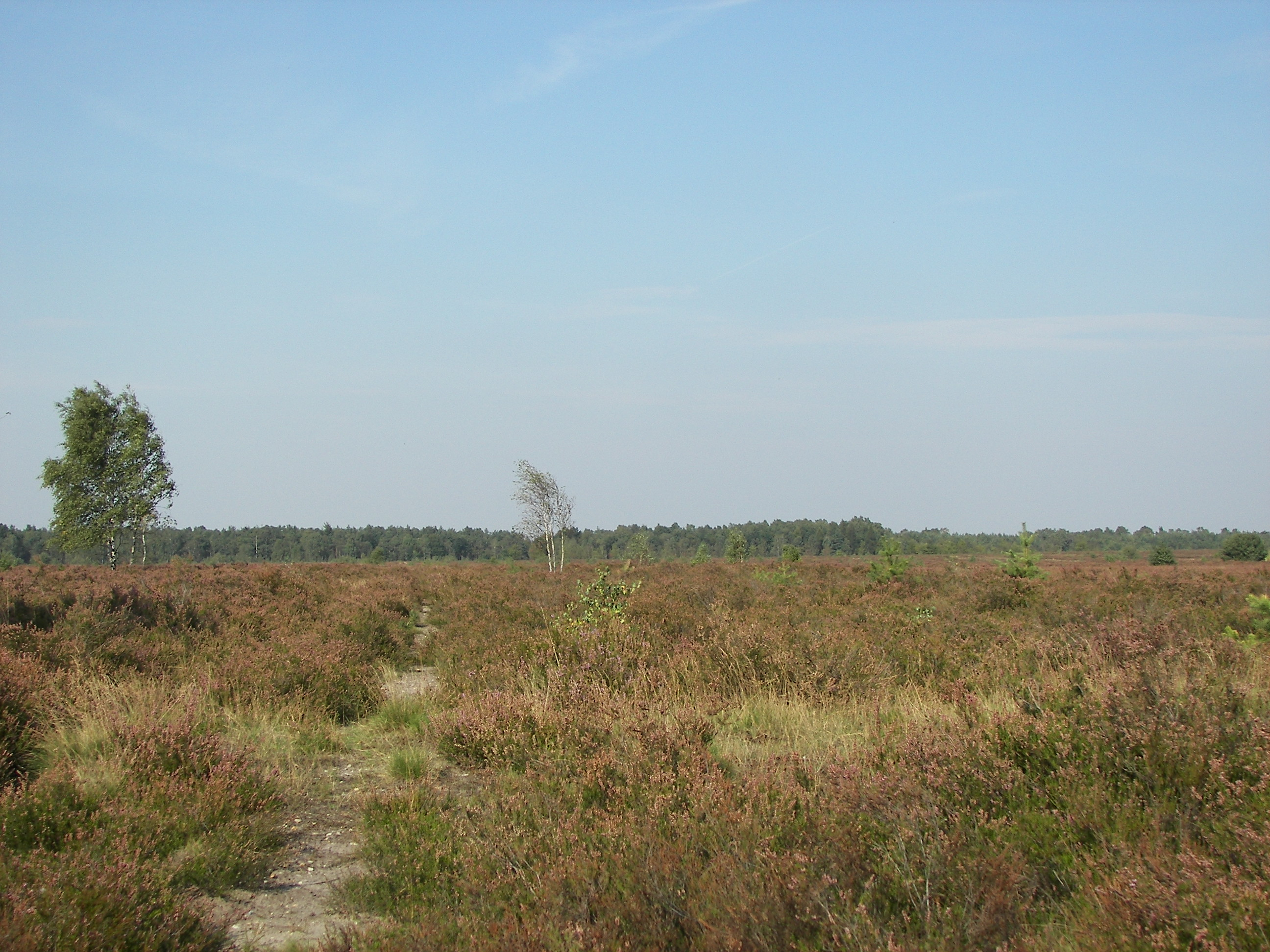 Osterheide bei Schneverdingen